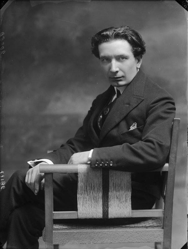 Antonio Guarnieri fotografato da Mario Nunes Vais